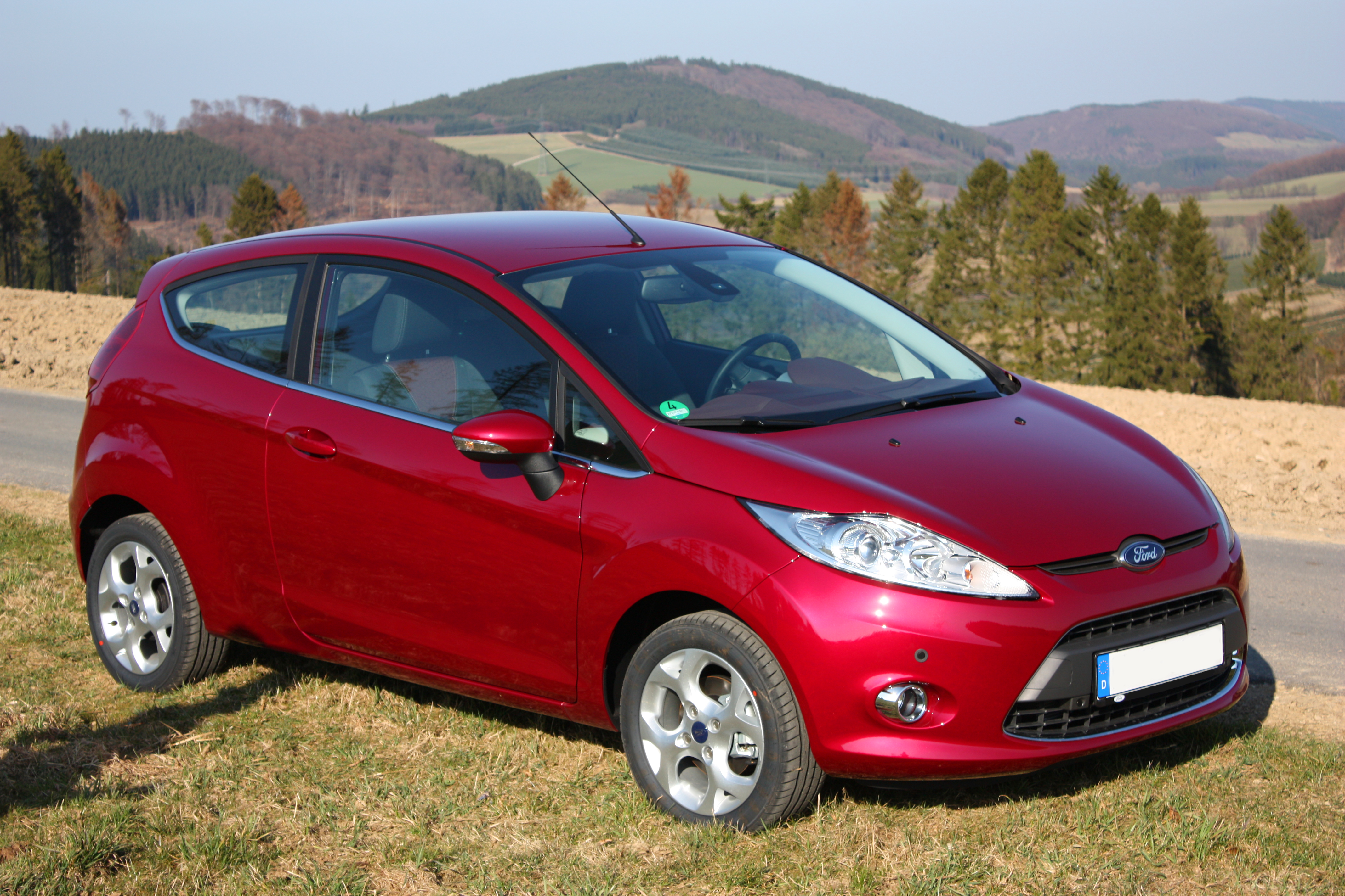 Ford Fiesta. Modellreihe 2008. Lack-Farbe: Hot Magenta.